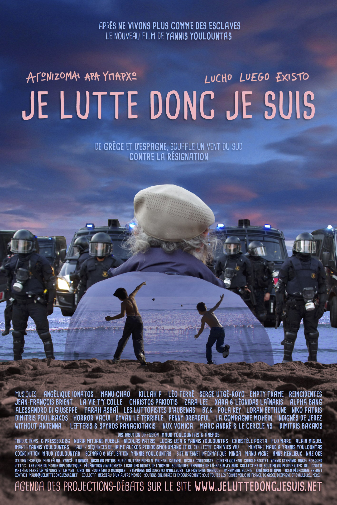 Affiche du film Je lutte donc je suis en licence libre CC0